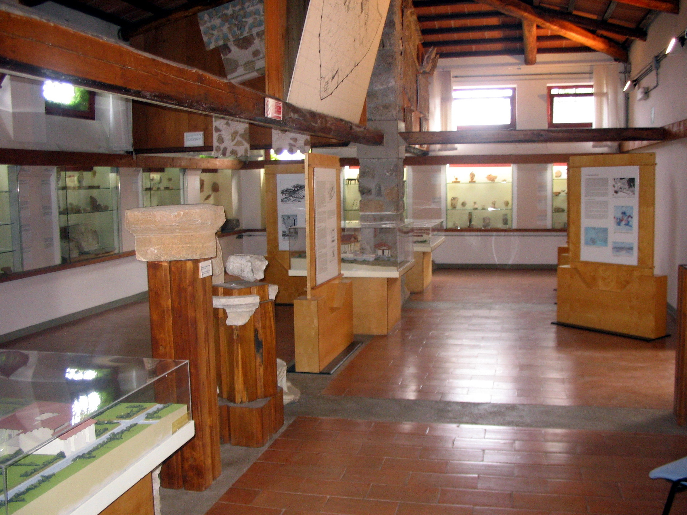 Museo di Cosa - Ansedonia - Orbetello - Toscana - Italia